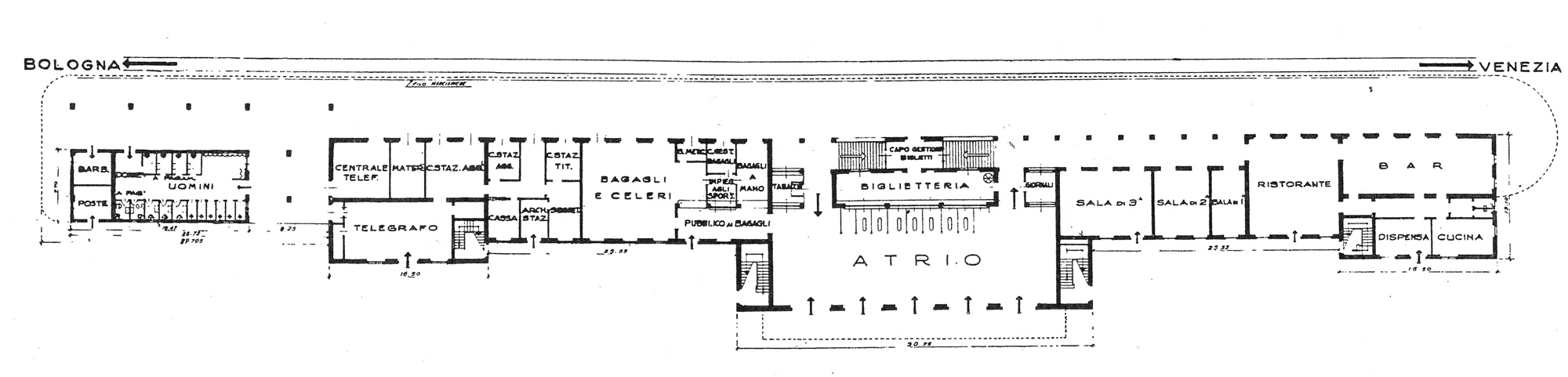 Stazione ferroviaria di Ferrara, pianta del piano terreno del fabbricato viaggiatori